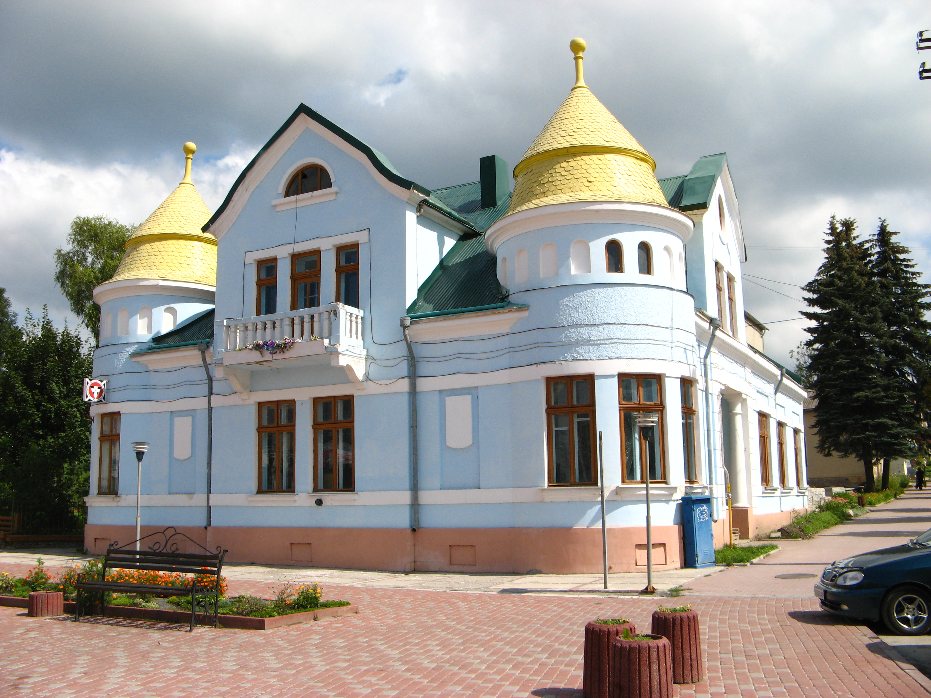 Підволочиськ. Вілла Громницьких (2012 р.)